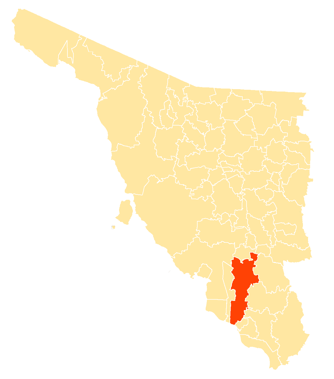 Municipio en Sonora, México.